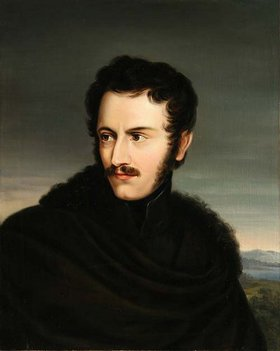 Nikolaus Lenau von Carl Rahl, 1834. Gemalt für Justinus Kerner.